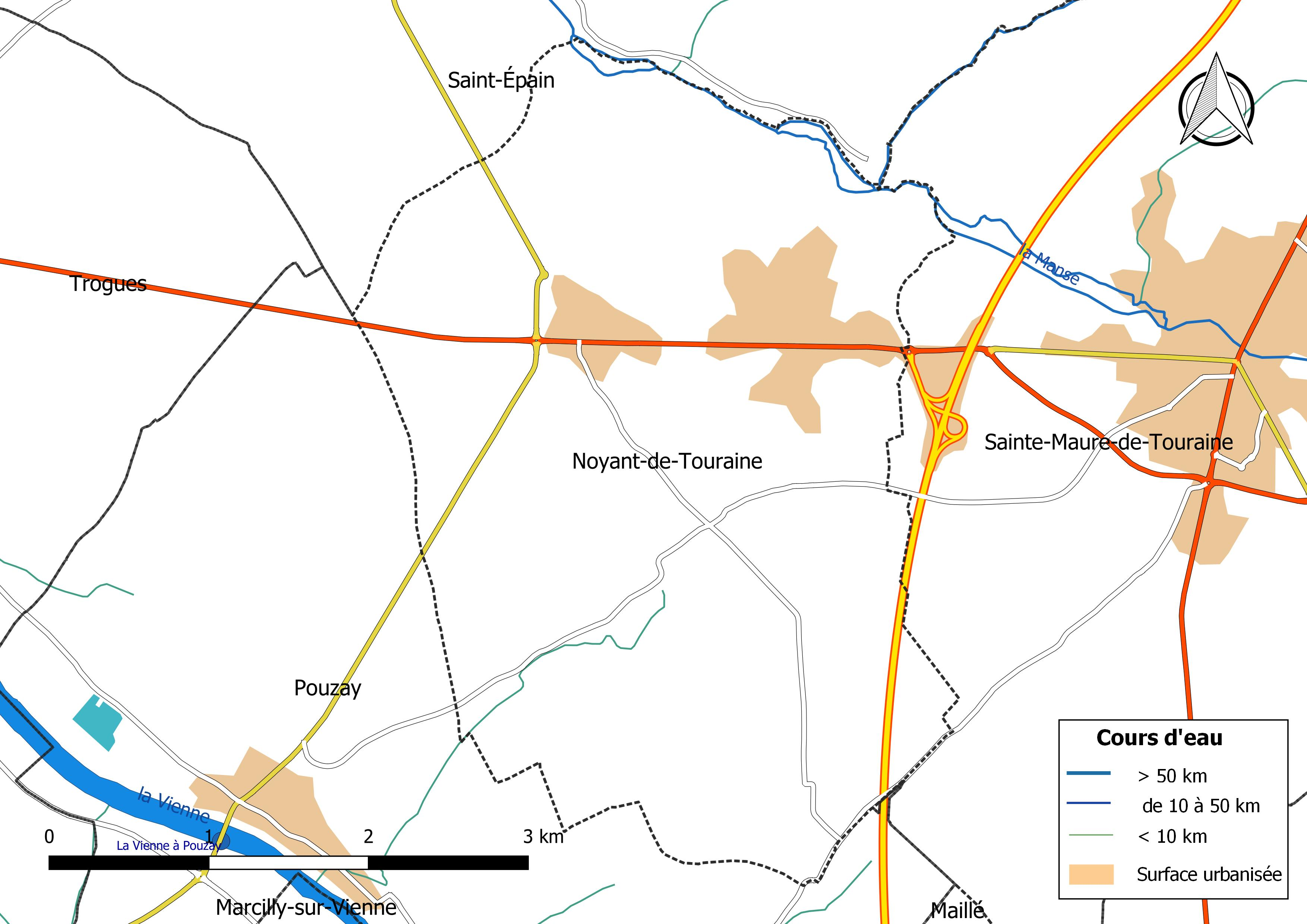 Carte du réseau hydrographique de la commune de Noyant-de-Touraine (France).